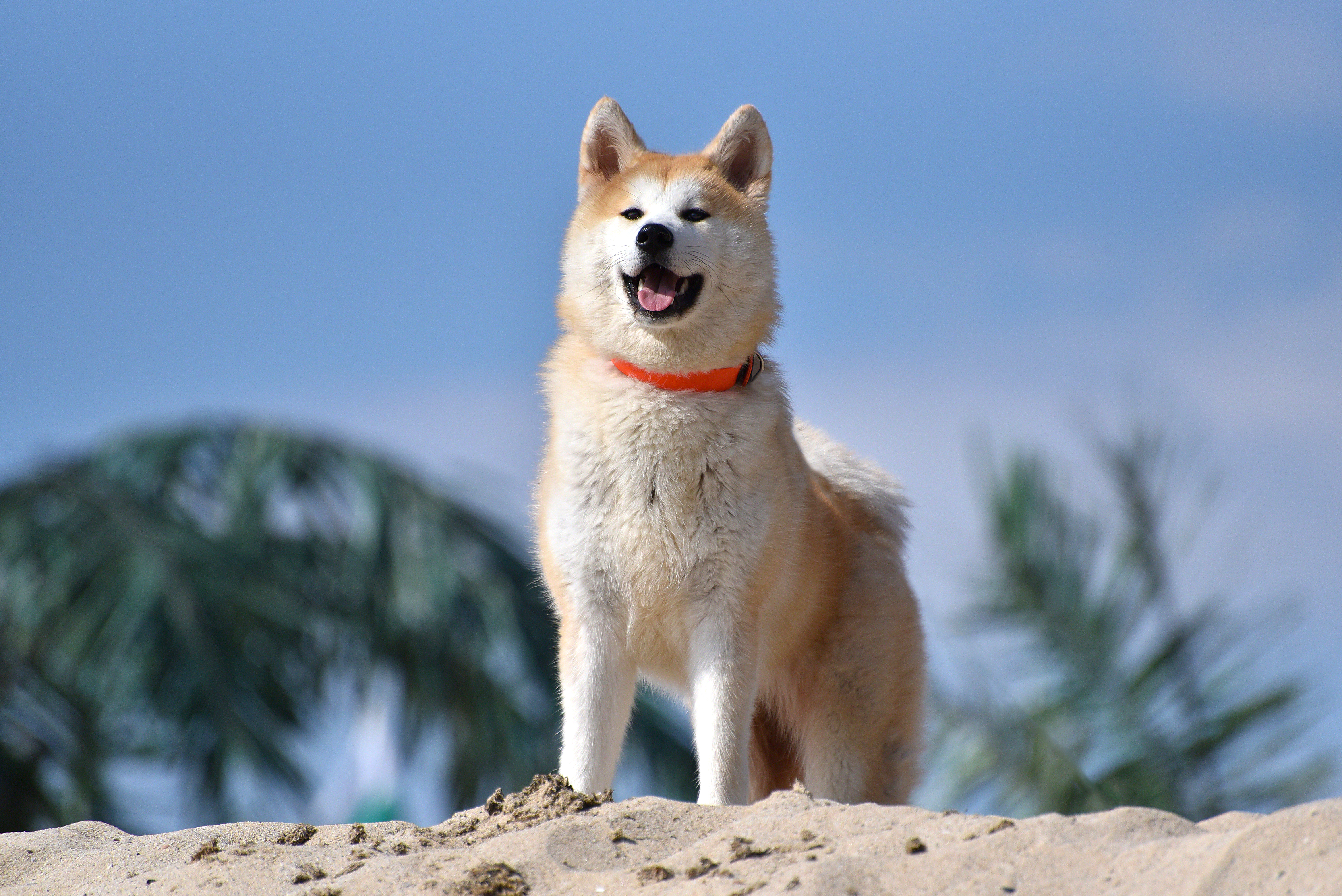 Порода куче Акита ину